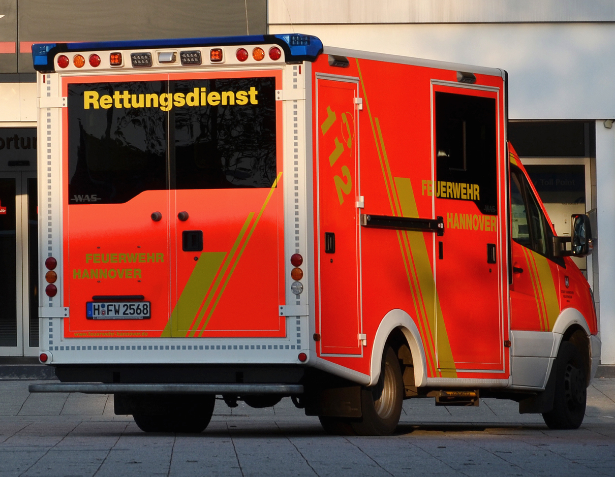 112-Notruf-Nummer an einem Rettungswagen der Feuerwehr Hannover